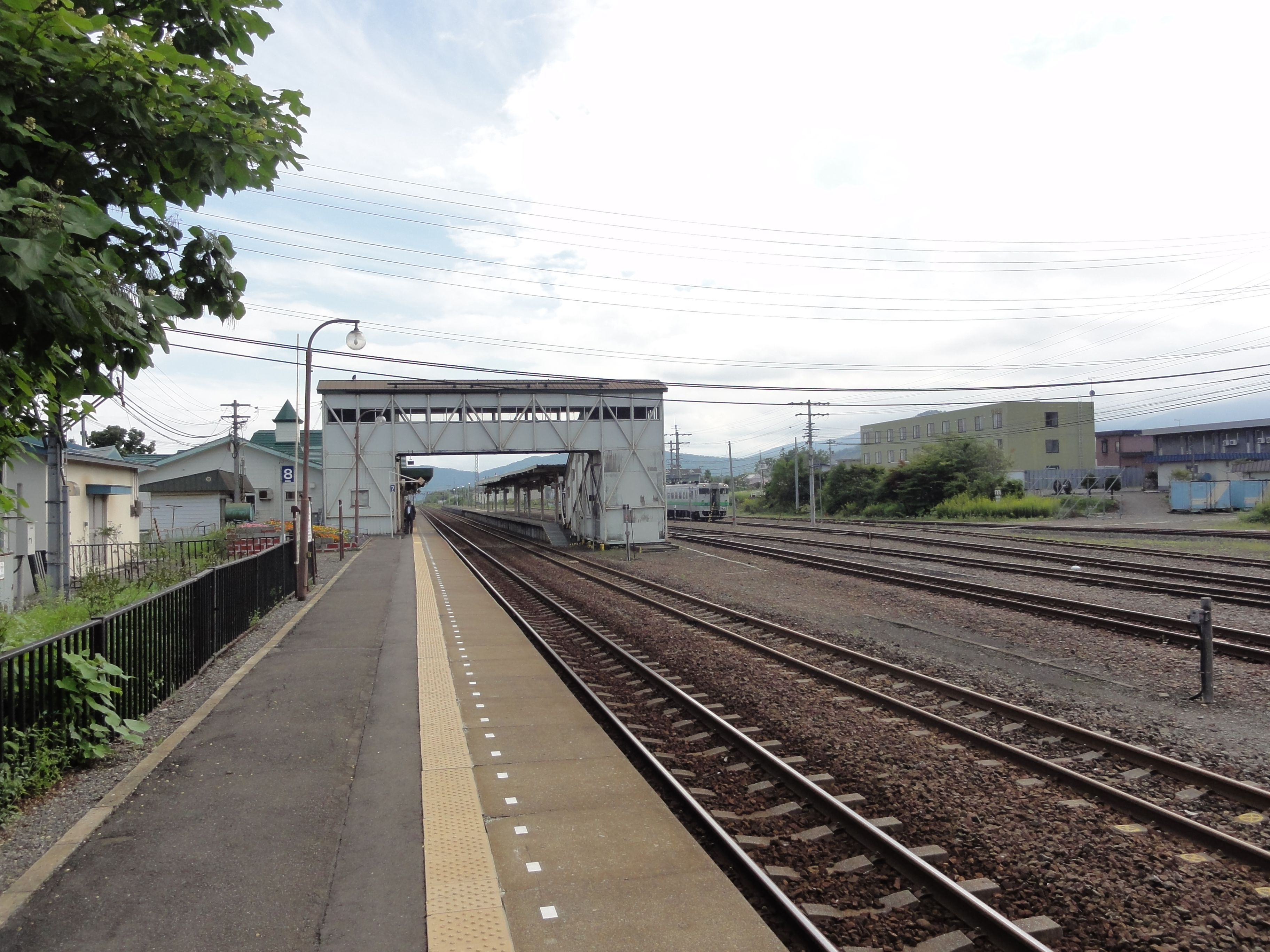 JR北海道 新得駅ホーム